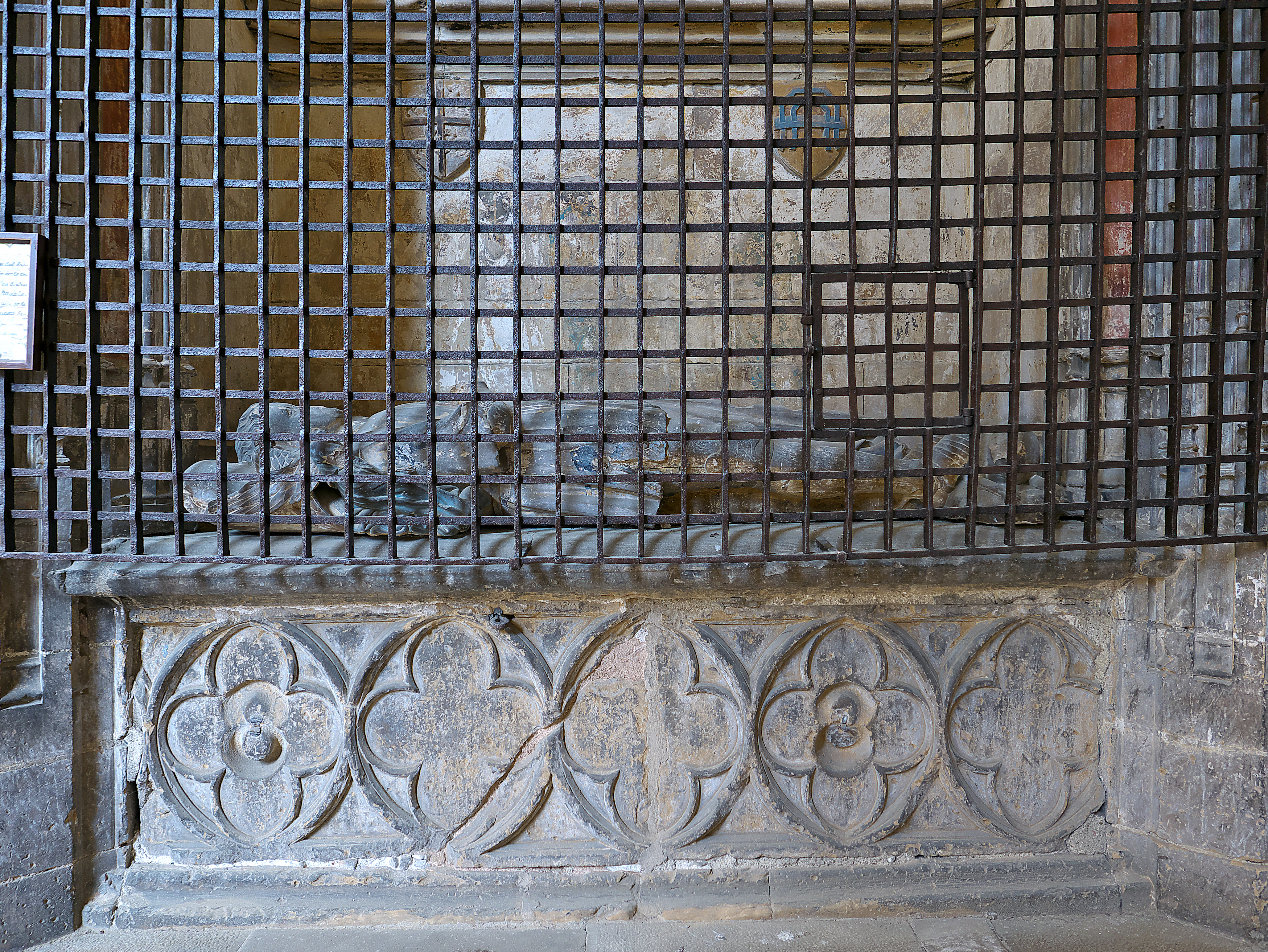 Claustro de la Catedral de Pamplona. Sepulcro (h. 1419-1421) con la figuras de Pere Arnaut de Garro (†1422) y su esposa Johana de Beunça.